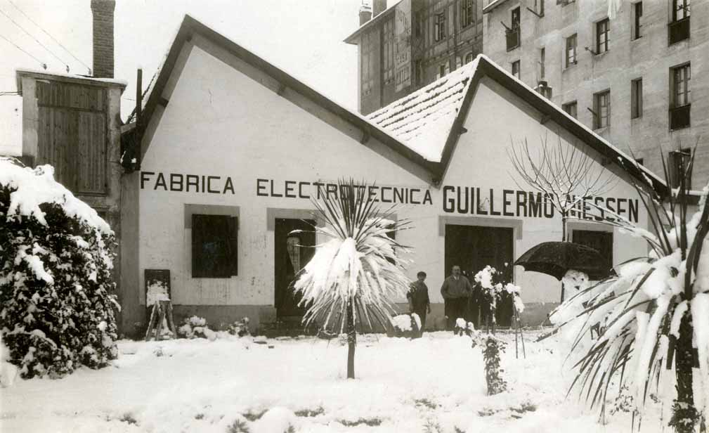 Niessen enpresaren eraikina Errenterian (Gipuzkoa), elurrarekin. Guillermo Niessen atean